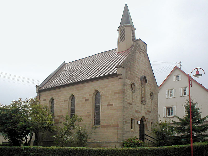 Josefskapelle im Brambacher Hof (Neuenstadt am Kocher)